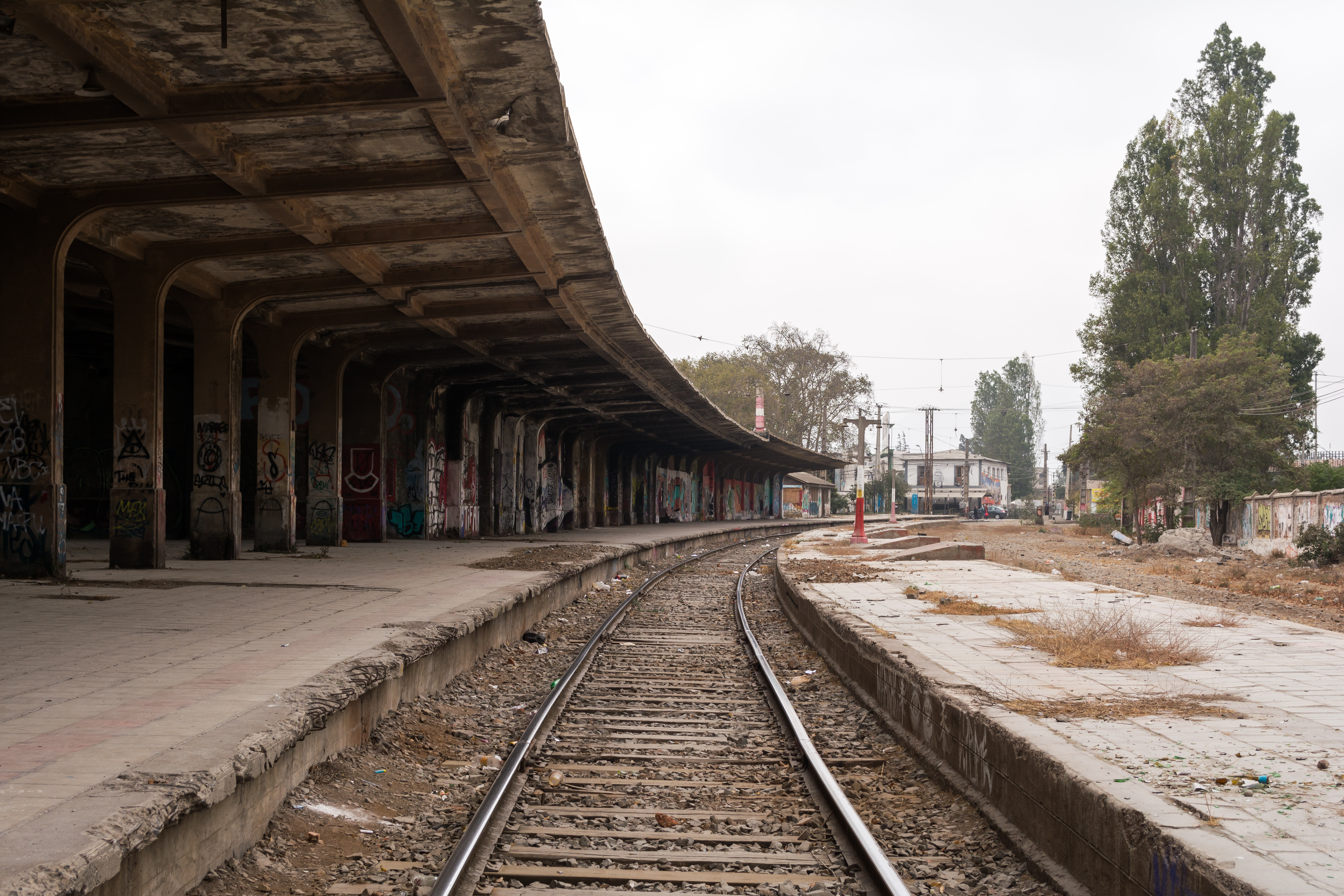 Estación Calera, La Calera, Región de Valparaíso, Chile